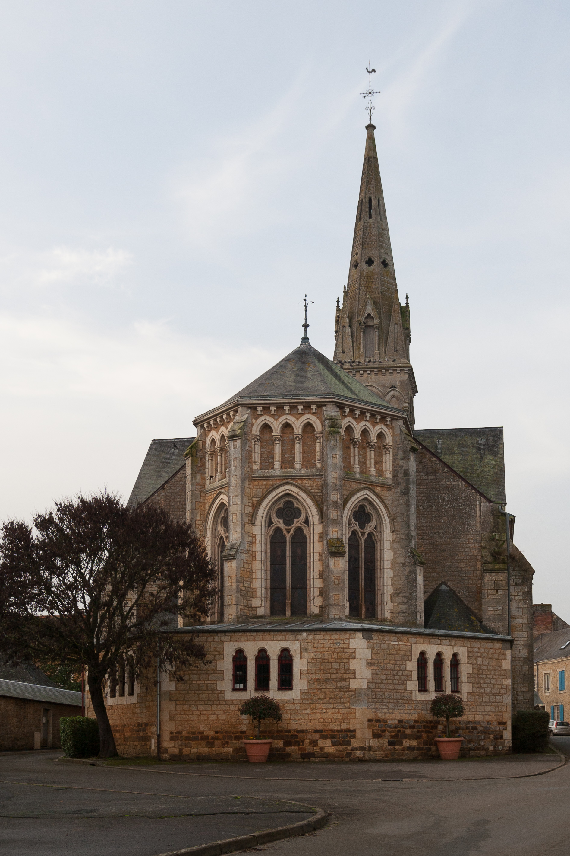 Église de Saint-Symphorien.